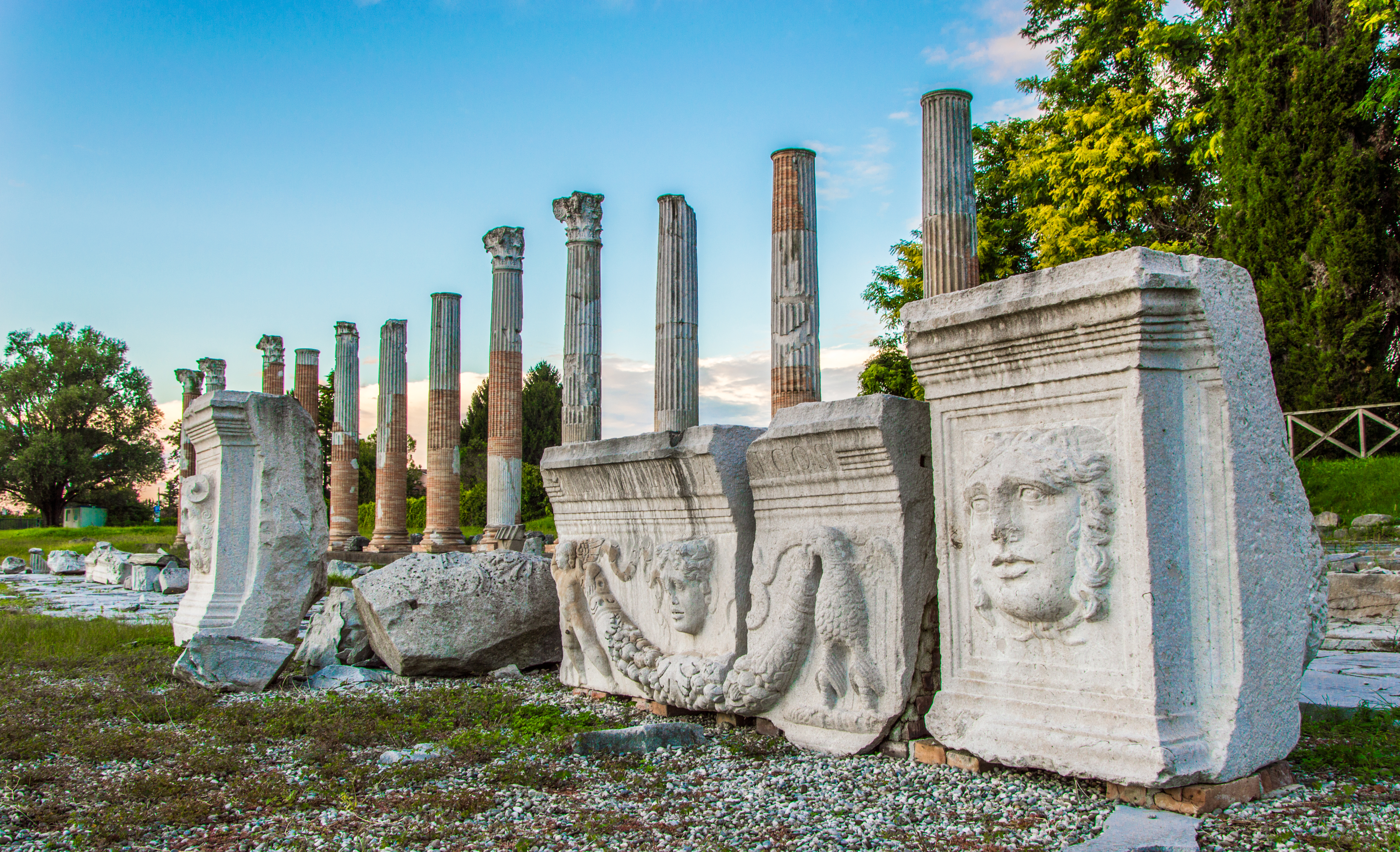 Foro romano di Aquileia - MIBAC This is a photo of a monument which is part of cultural heritage of Italy.